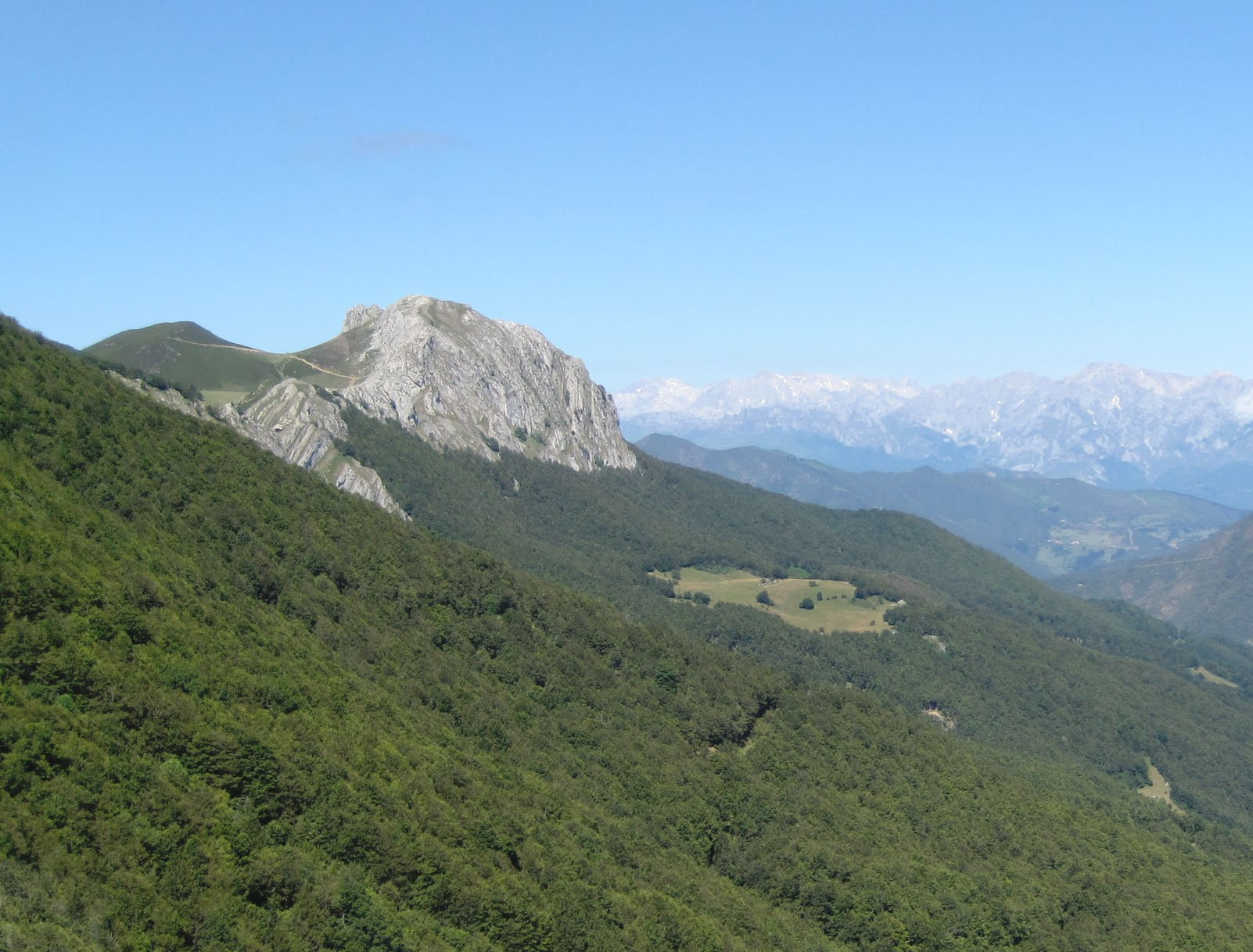 Peña de Brez o Ciquera, con los Picos de Europa al fondo. Cordillera Cantábrica. Desde el mirador de Piedraluengas